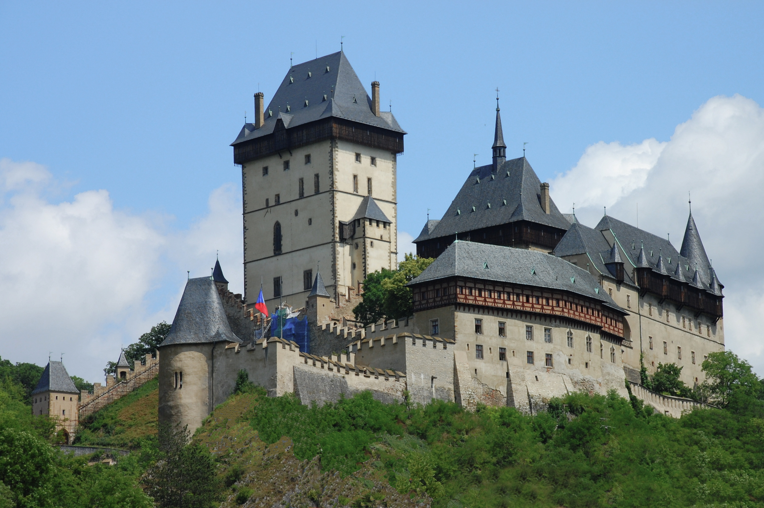 Zamek Karlštejn